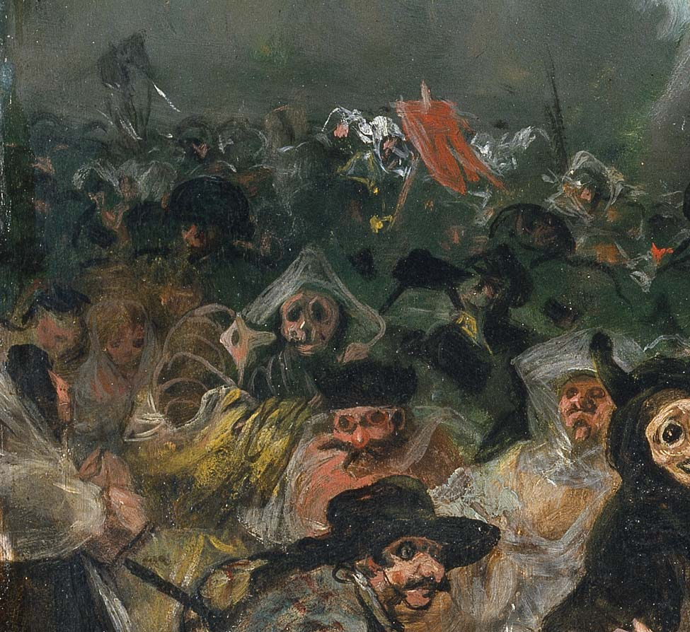 Francisco de Goya: El entierro de la sardina (cropped detail from this painting)